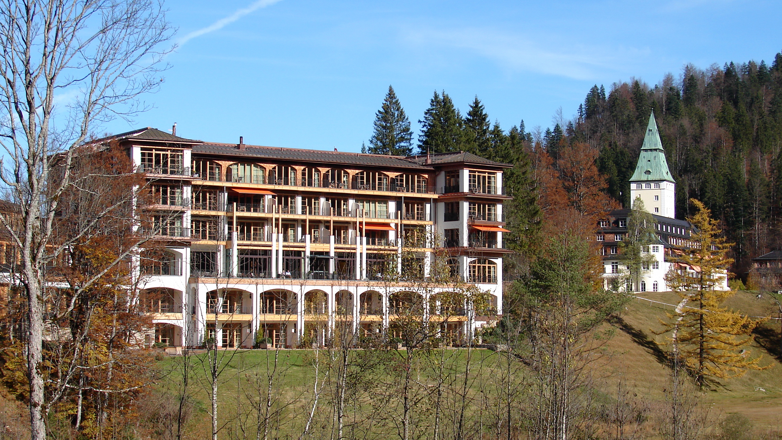 Schloss Elmau ist ein von Carl Sattler in Formen der Reformarchitektur während des Ersten Weltkriegs von 1914 bis 1916 erbauter vierflügeliger, zweigeschossiger Gebäudekomplex mit ausgebautem Walmdach, Turm und Vorhallen.